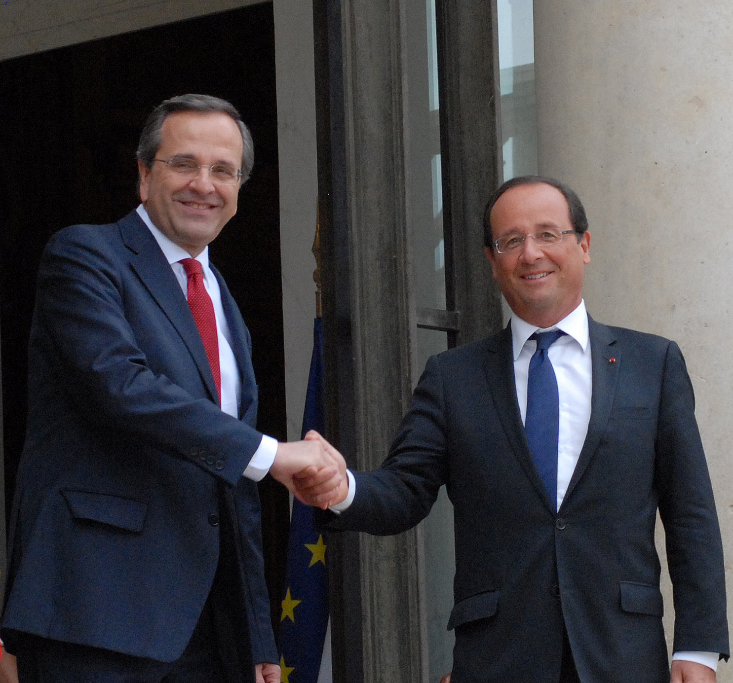 Francois Hollande - Αντώνης Σαμαράς